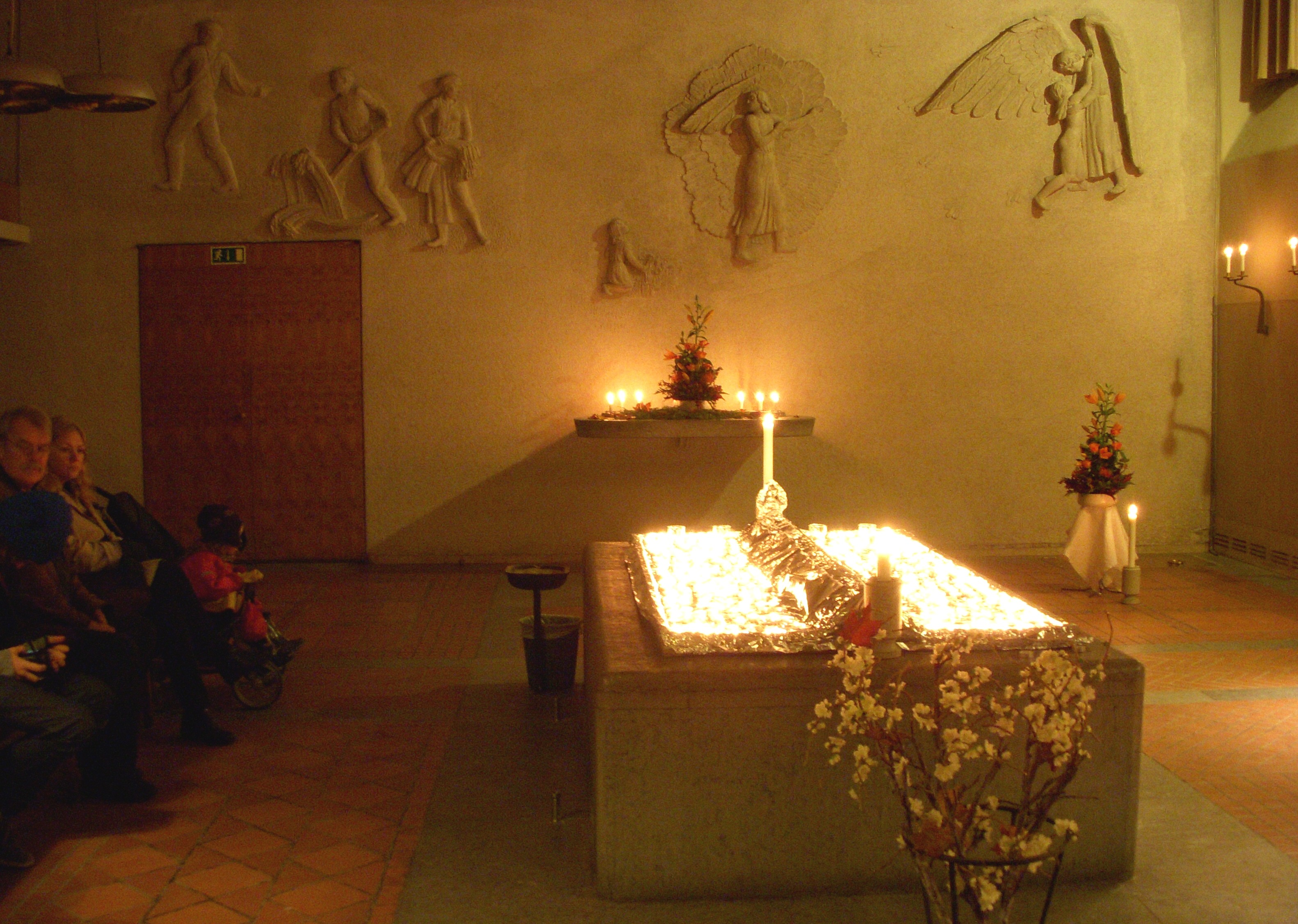 Skogskyrkogården i Stockholm, Skogskrematoriets kapell